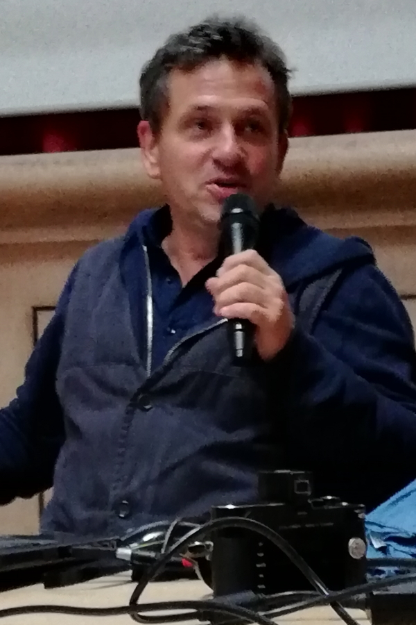 Pierre de Vallombreuse aux rencontres photographiques du Rivatoria à Jassans-Riottier, Ain, France